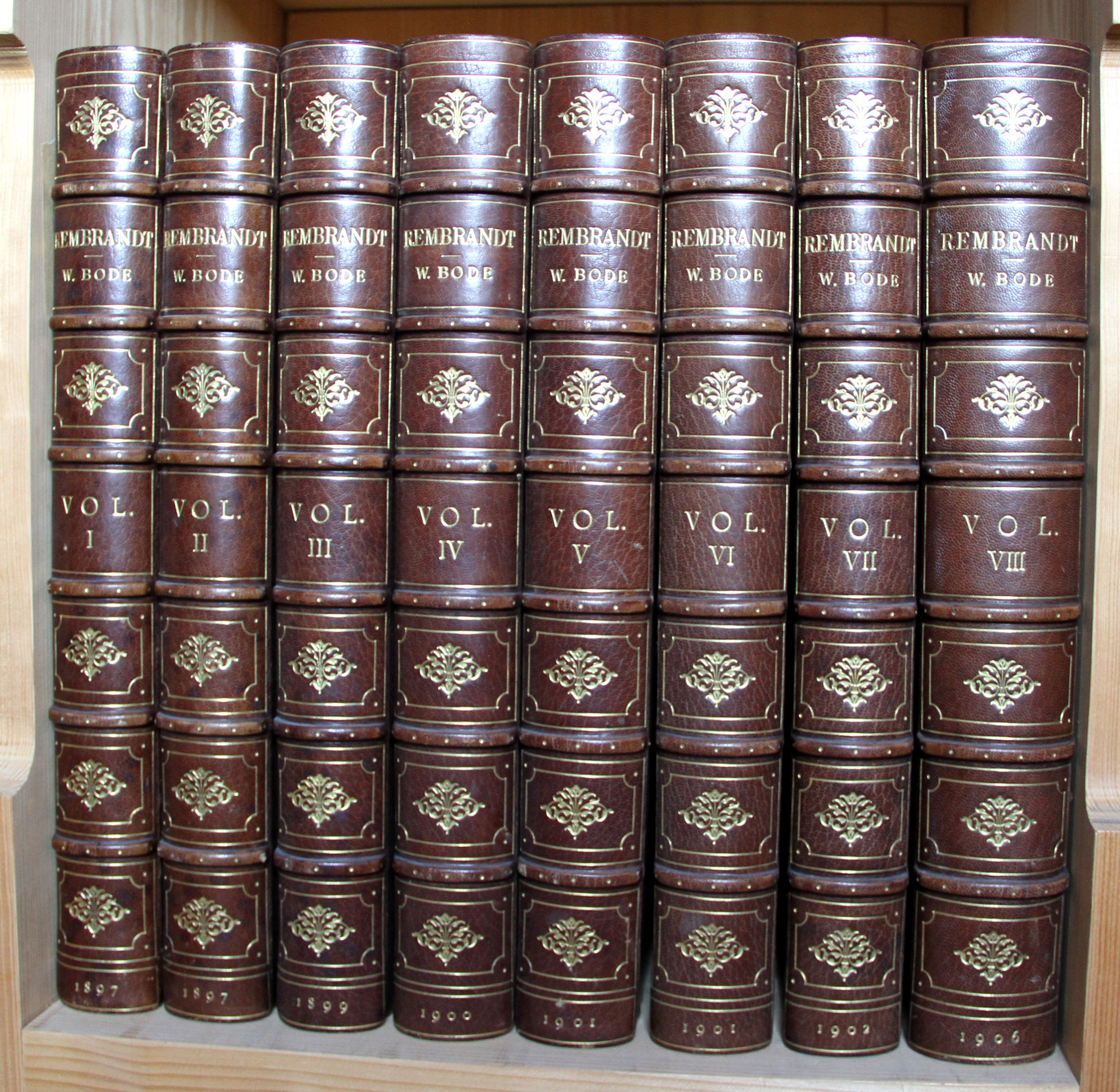 Foto der Buchrücken von:„The Complete Work of Rembrandt – Wilhelm Bode, Hofstede de Groot, Volume 1-8, Charles Sedelmeyer Publishers 1897-1906